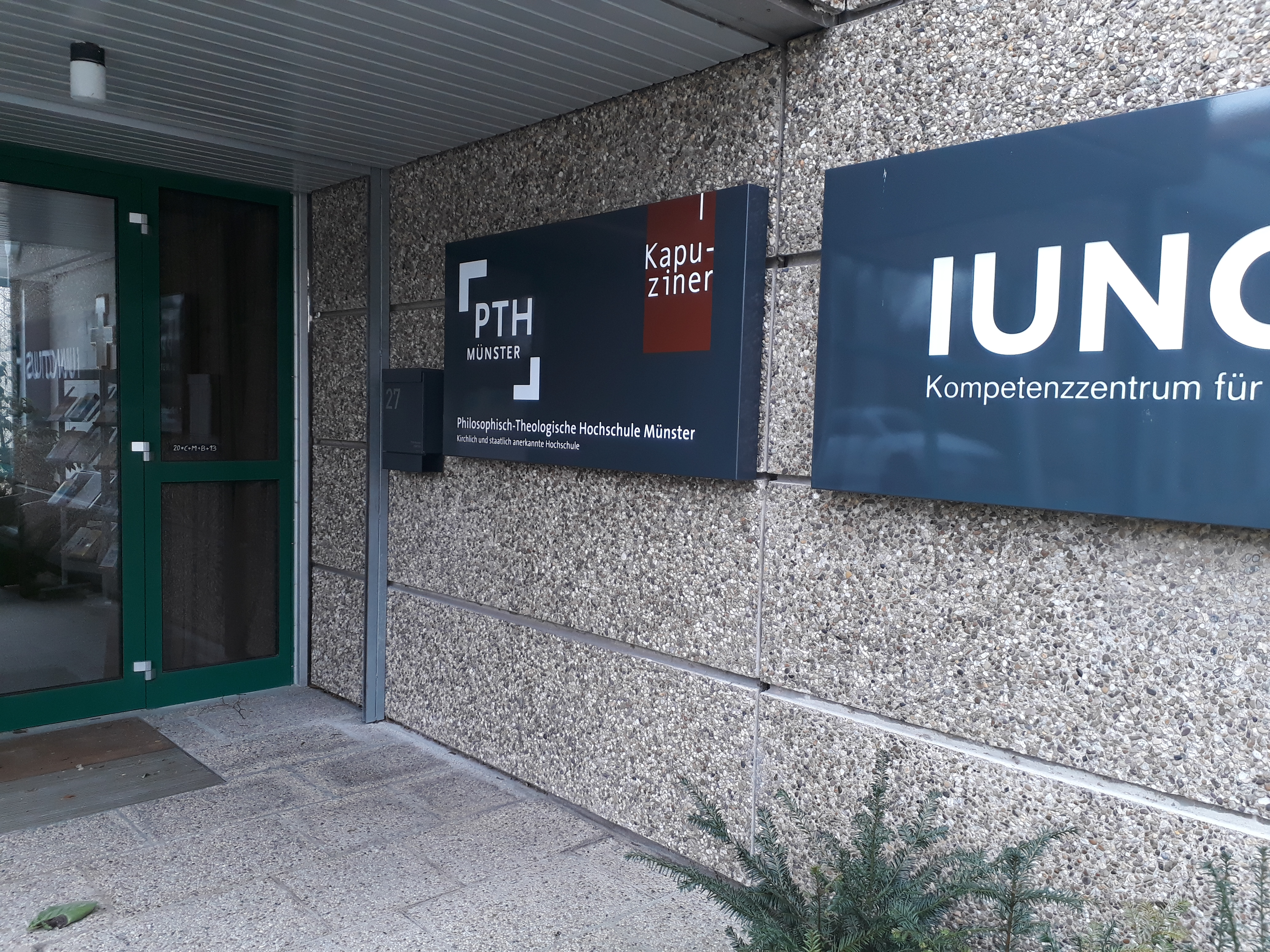 PTH Münster